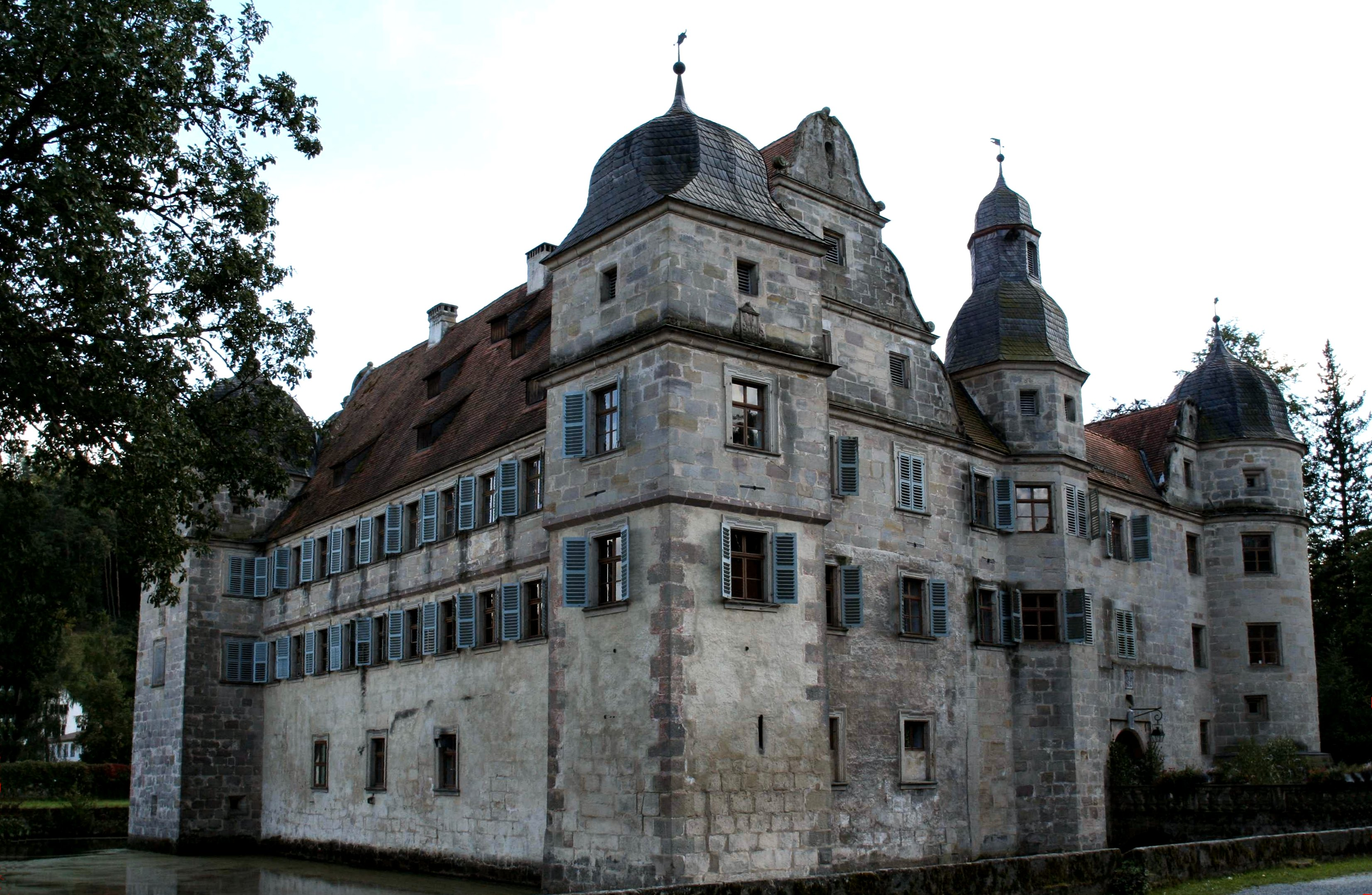 Wasserschloss Mitwitz (Nord-West-Seite) im Landkreis Kronach in Bayern